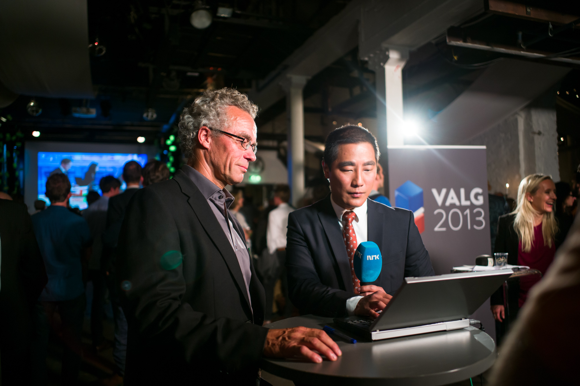 Månefisken, foto: Svein Gunnar Kjøde